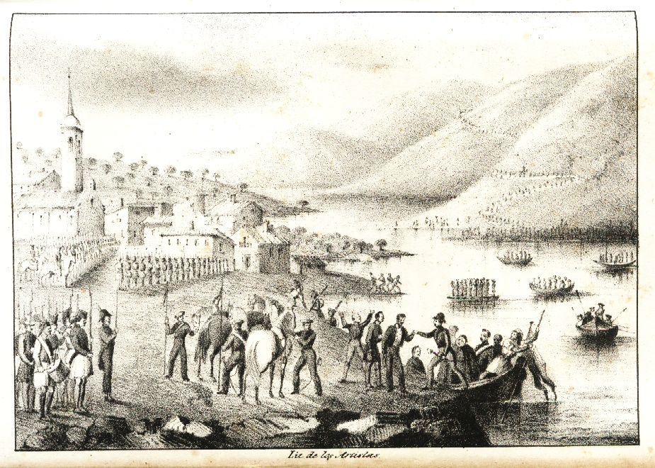 Expedición Real. Paso del Ebro por Xerta